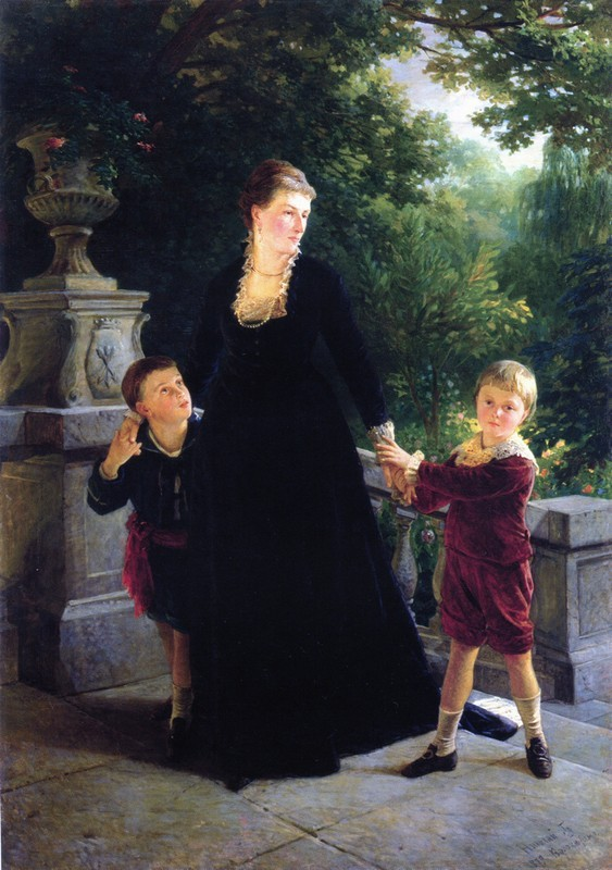 Мария Андреевна Скоропадская, ур. Миклашевская (1841—1901) с сыновьями Михаилом и Павлом.